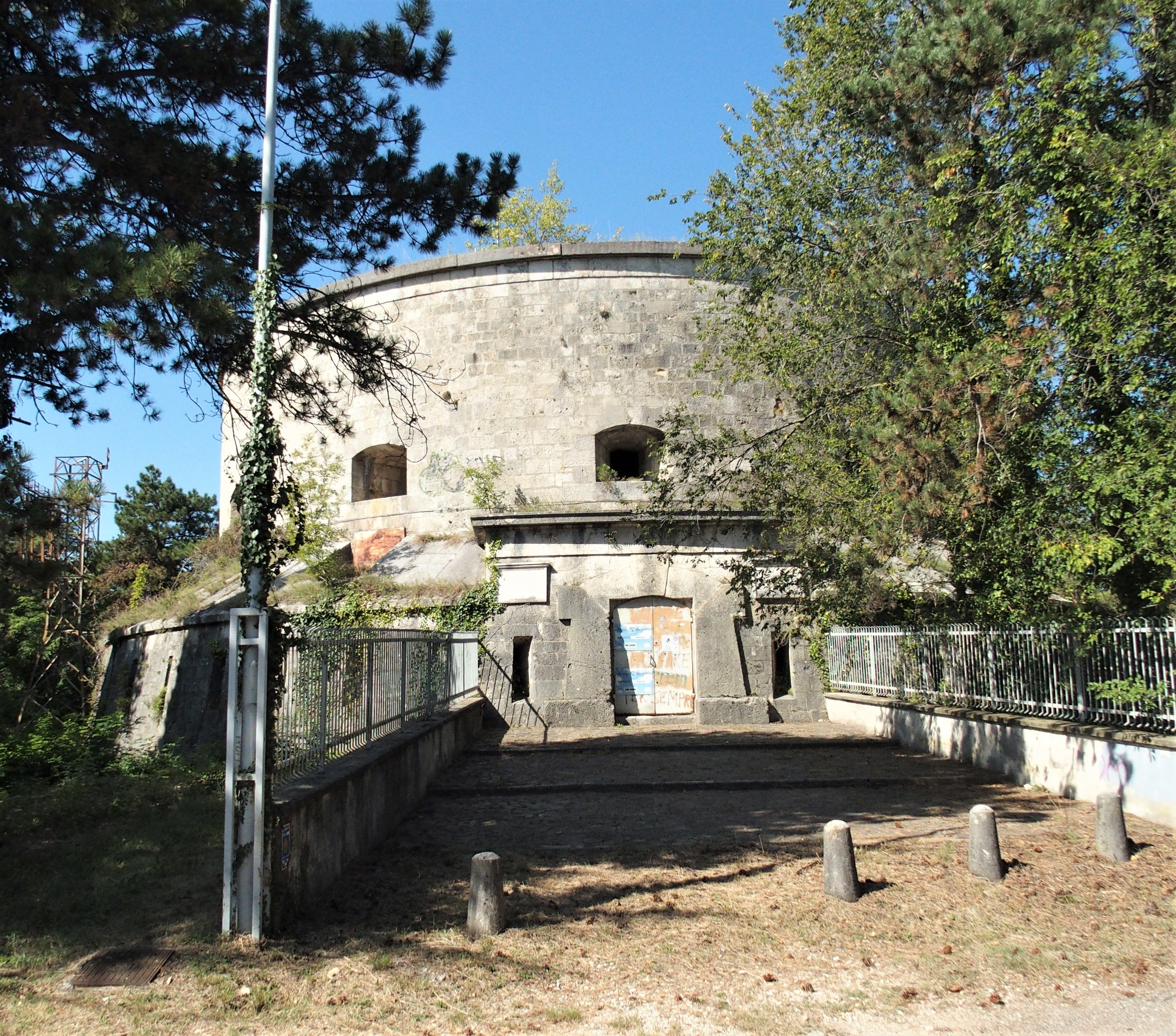 Torri Massimiliane, opera militare austriaca This is a photo of a monument which is part of cultural heritage of Italy.